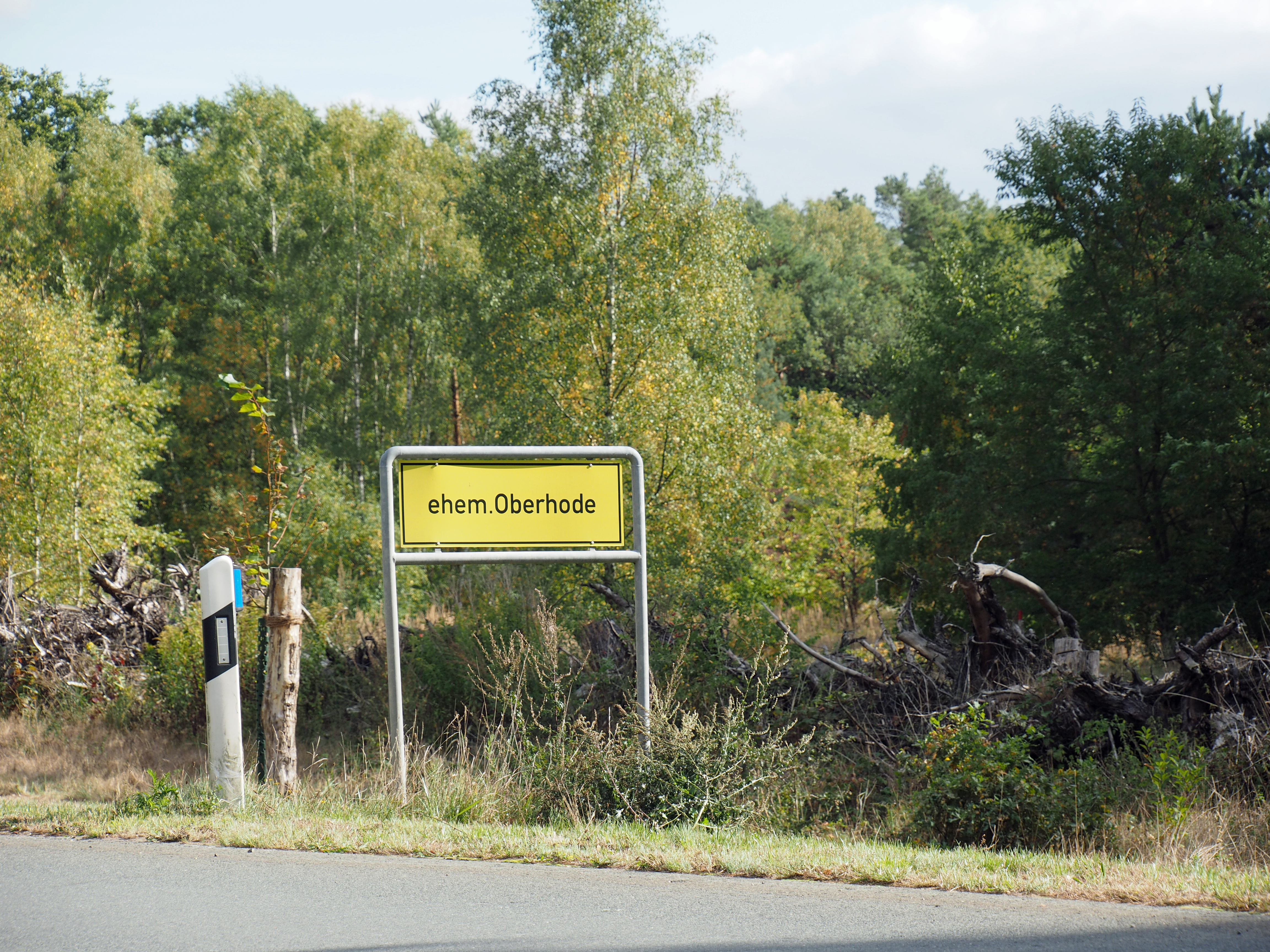 Hinweisschild auf die ehemalige Gemeinde Oberhode (Osterheide), auf dem Truppen-Übungsplatz Bergen